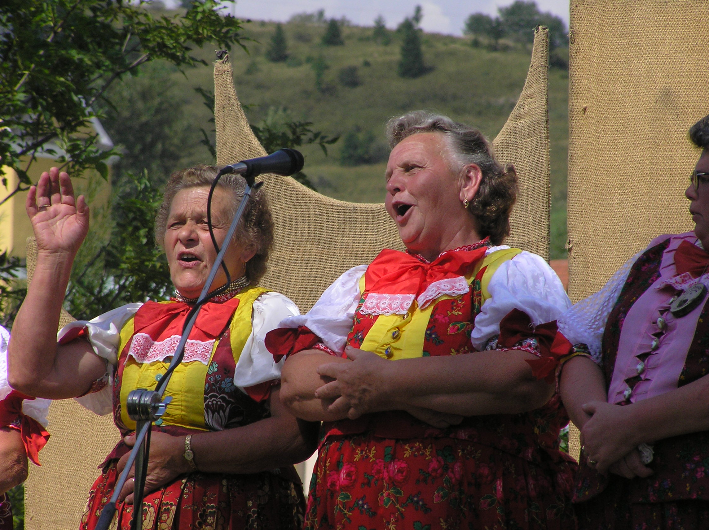 Veľké Borové, ženy z obce spievajú na folklórnom festivale amatérskych hudobníkov Letokruhy